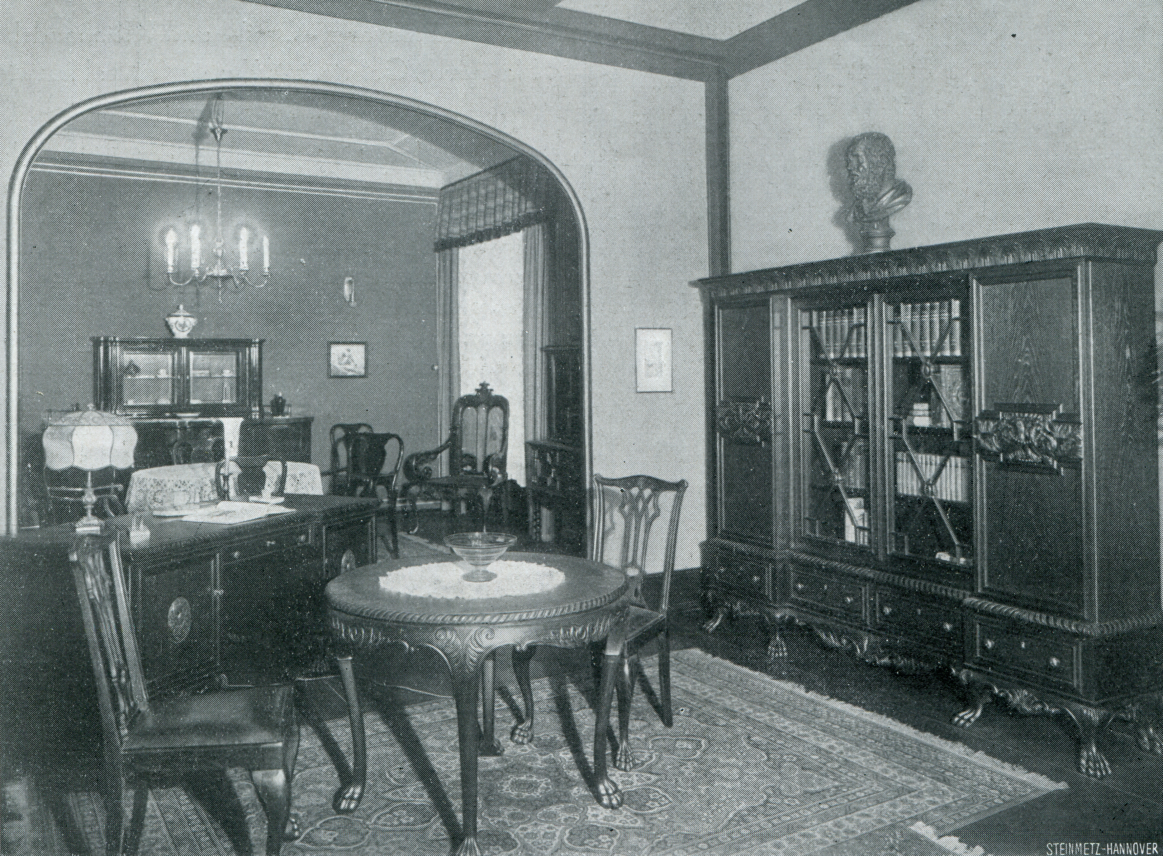 Blick um 1925 in die möblierte Eingangshalle des „Möbel-Magazins des Tischler-Amts“ in Hannover, Lange Laube 7A